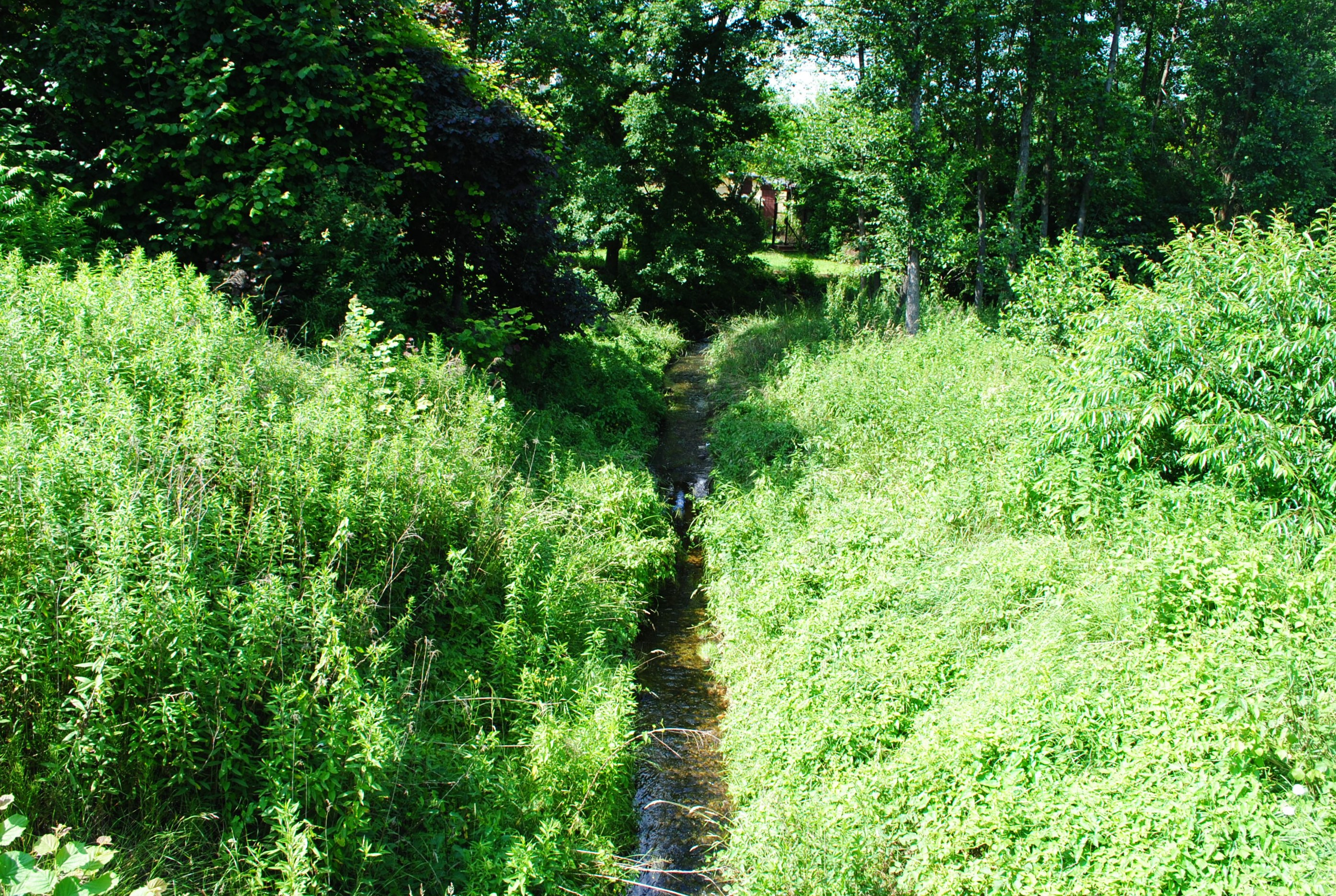 Katowice-Giszowiec. Bolina Południowa